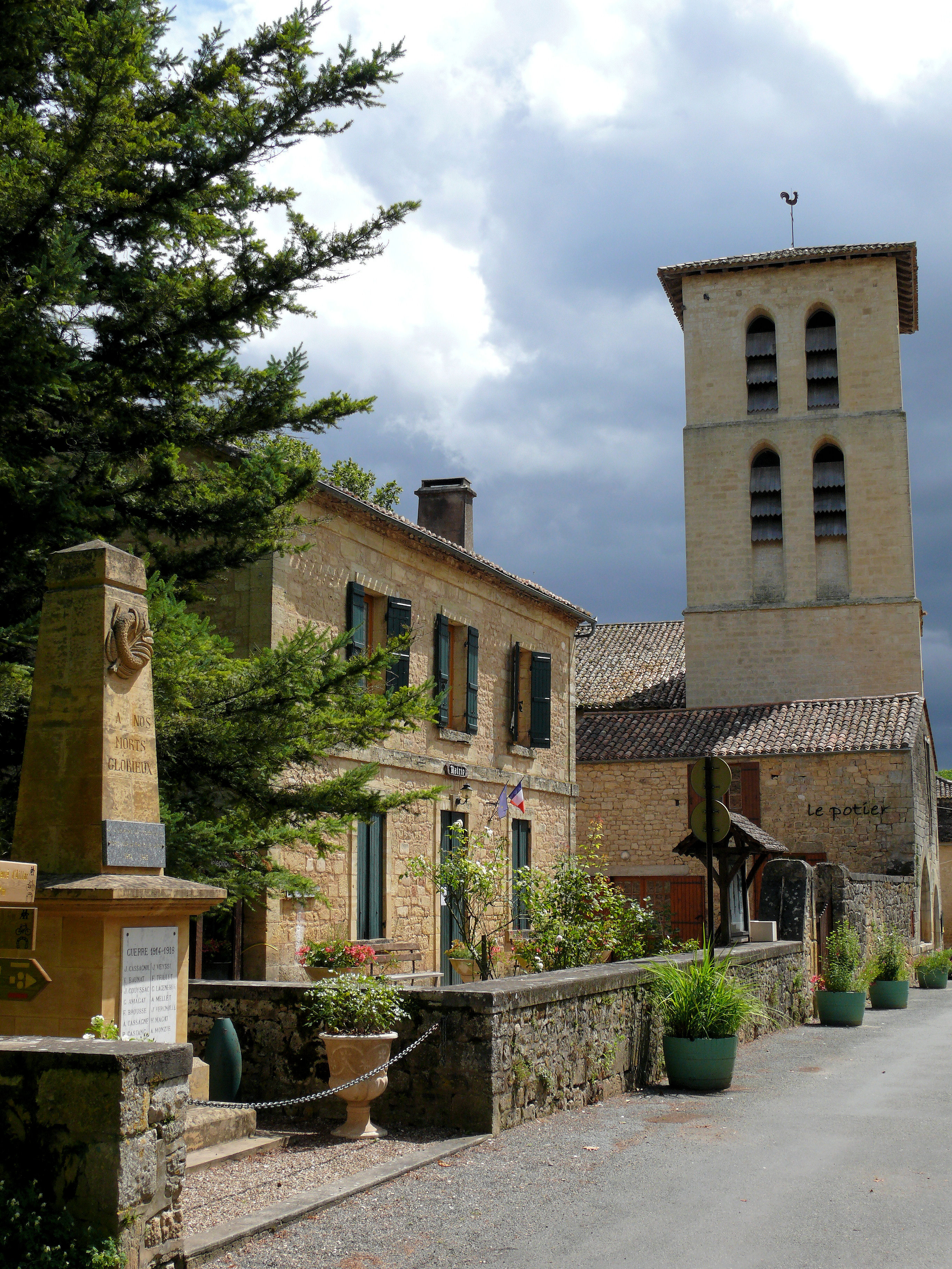 Molières - La mairie et l'église